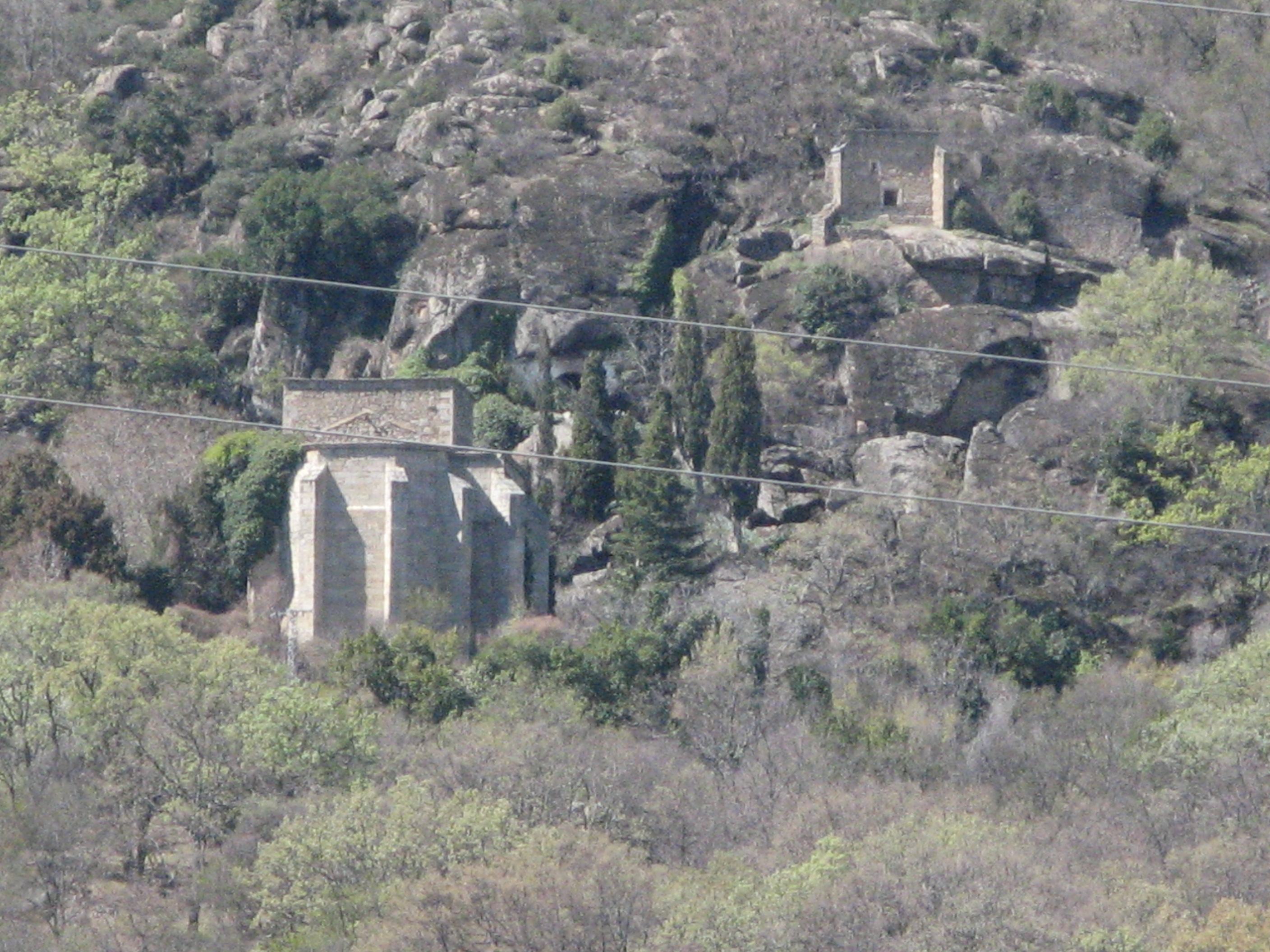 Cerro Guisando. Frente a los Toros de Guisando. El Tiemblo. Provincia de Ávila, Castilla y León. España